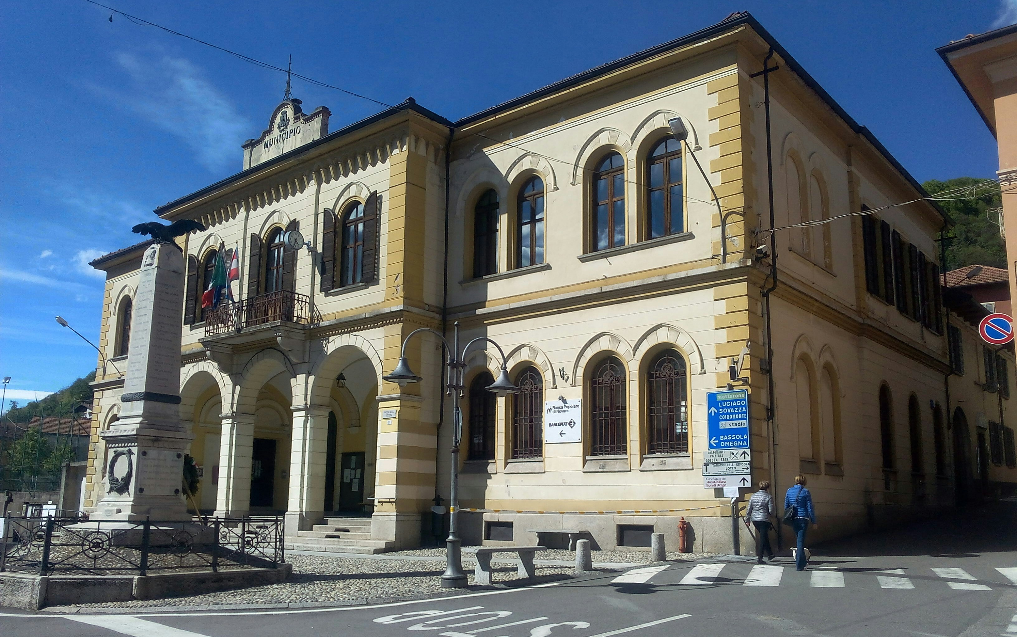 Armeno (IT): municipio